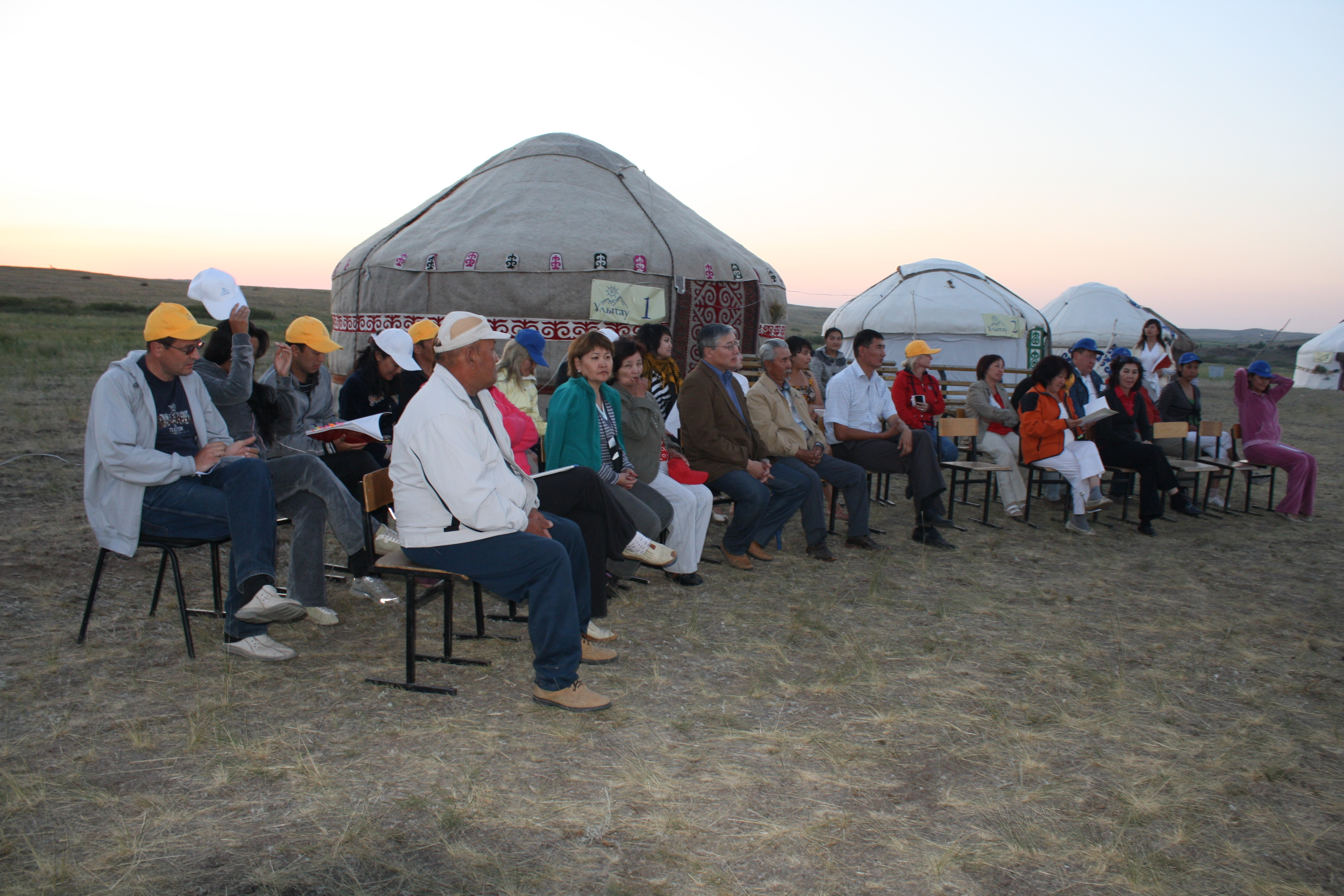 Культурно-лингвистический лагерь «Улытау», проводимый Международной академией бизнеса.